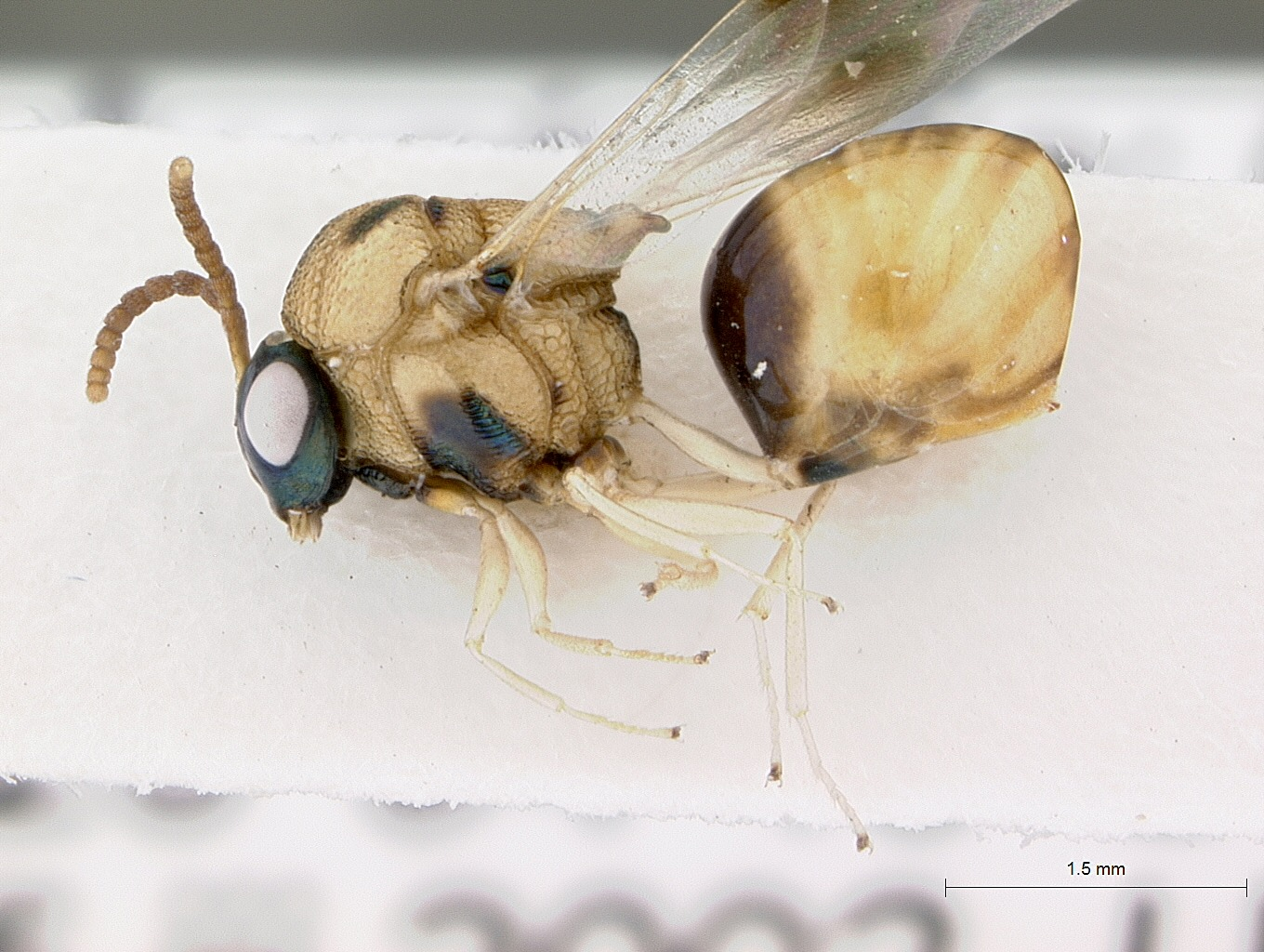 Stilbula quinqueguttata, specimen from Australia: QLD: Mt Isa, Moondaara Lake, 334m 20°34'43"S 139°34'40"E 5 Mar 2002 J. Heraty riverine trees H02-015